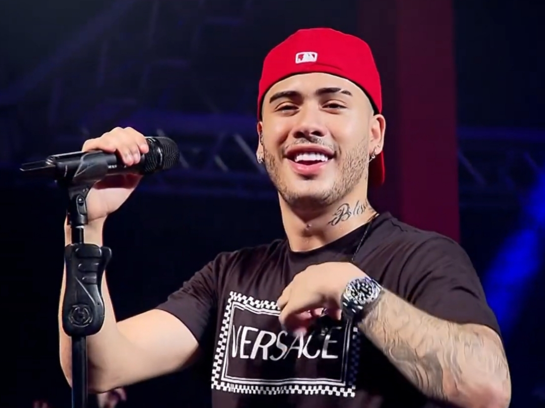 MUITO FUNK: KEVINHO AGITA PÚBLICO DE GOIÂNIA